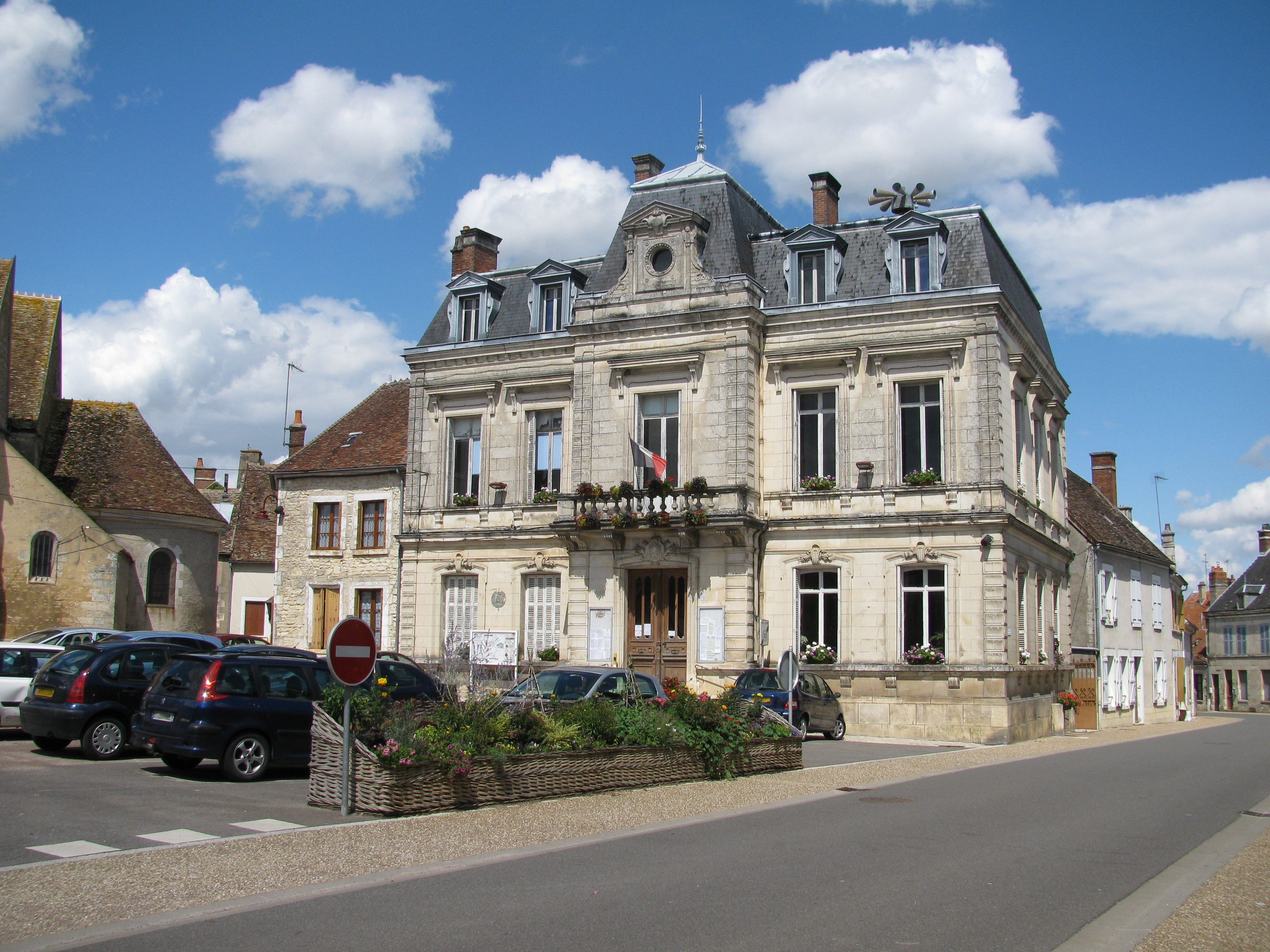 Mairie d'Entrains-sur-Nohain, Nièvre.